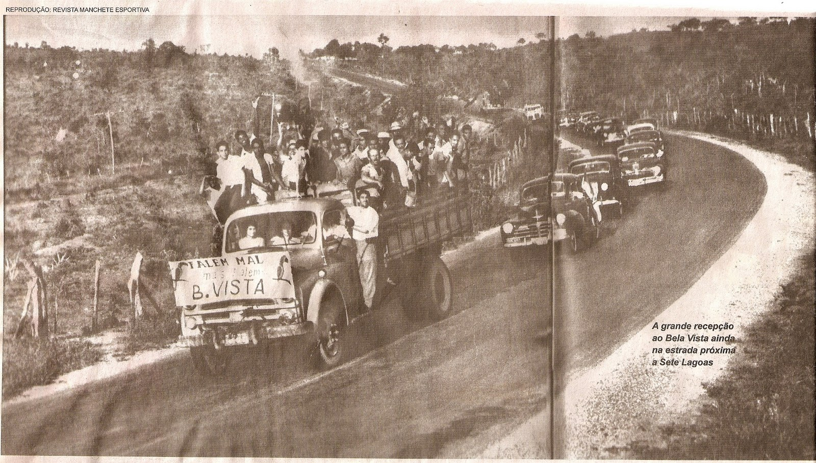 Jogadores foram recebidos como heróis